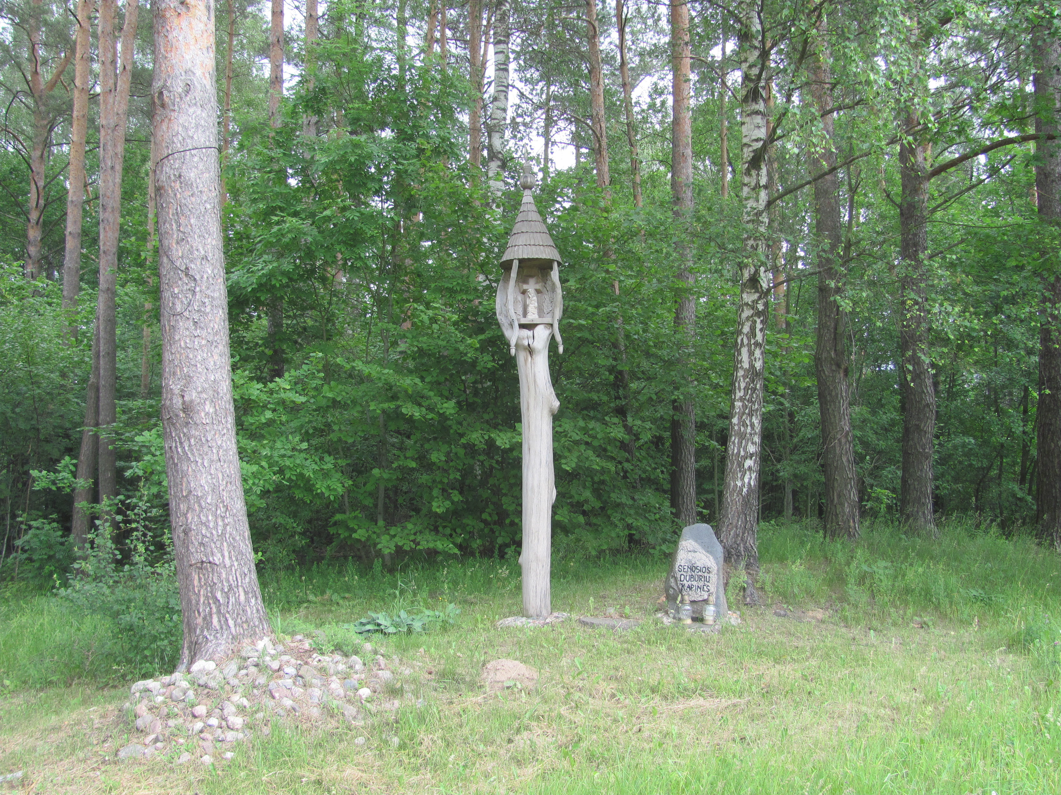 Imbrado sen., Lithuania